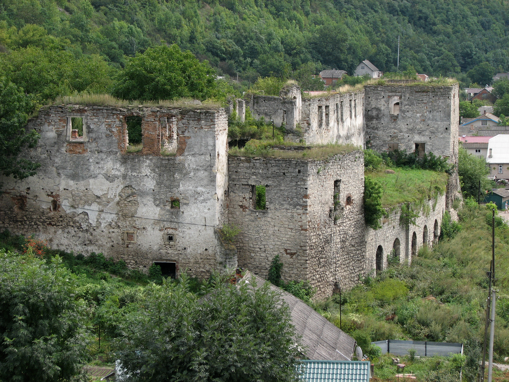 Замок Гольських, Чортків, вул. Замкова